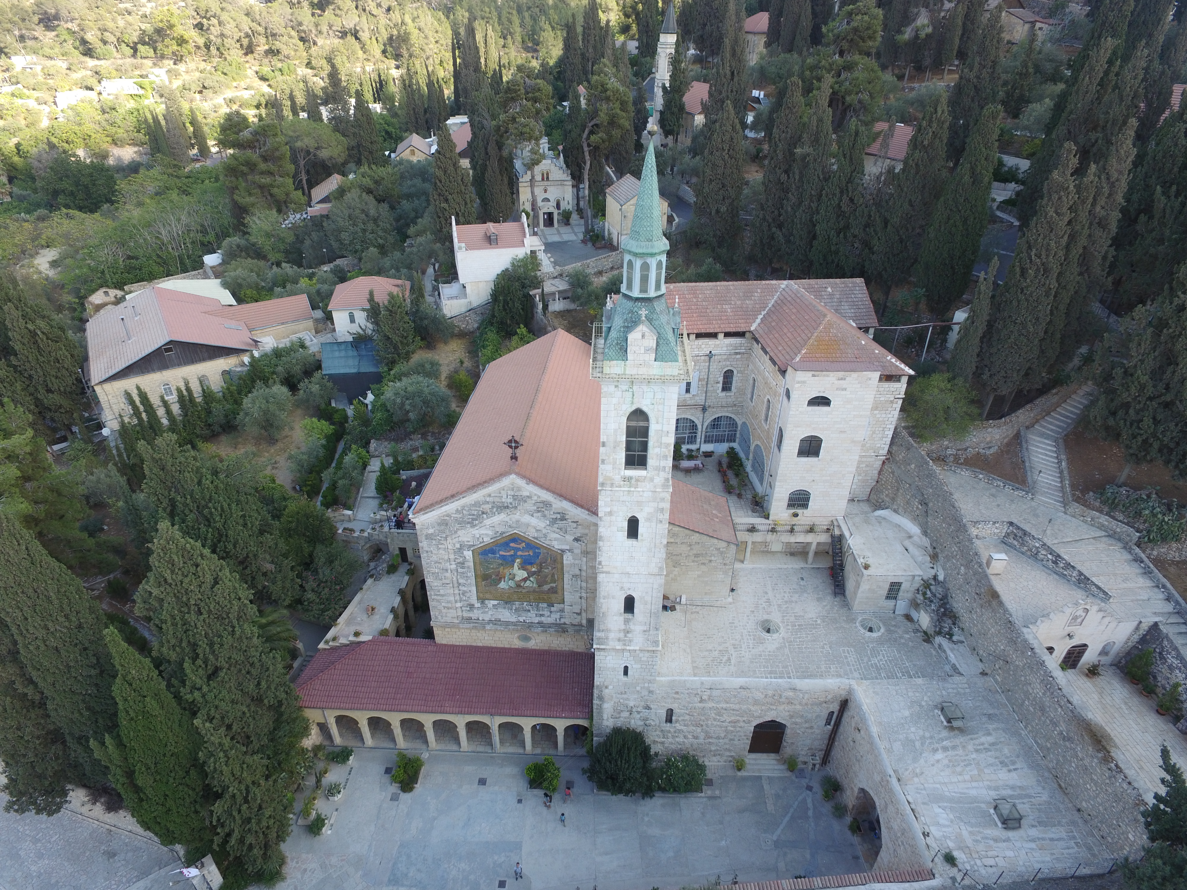 הכנסייה